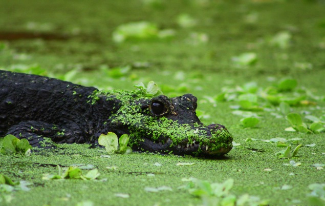 Une petite espèce de crocodile à la mâchoire très puissante